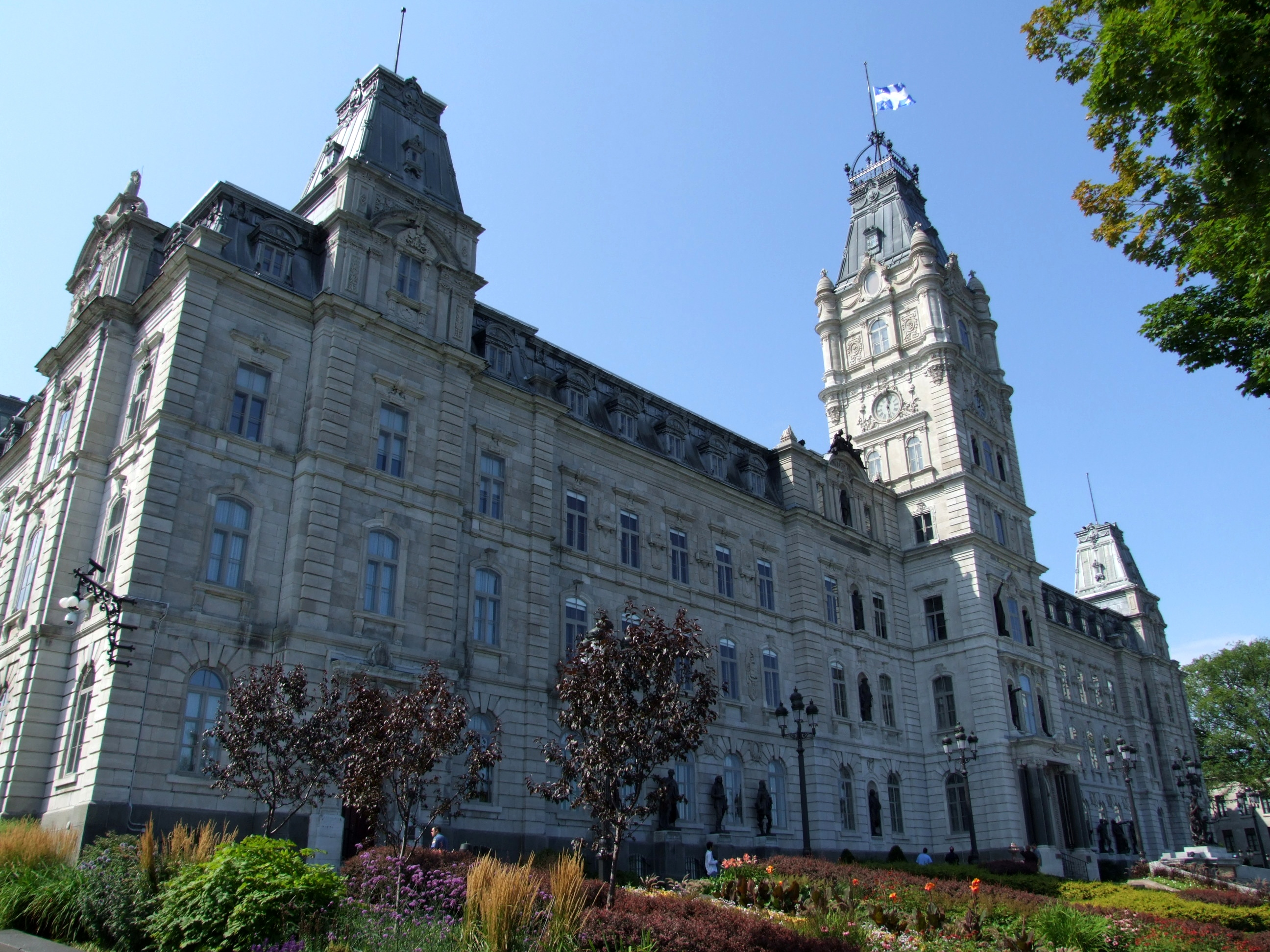 Hôtel du Parlement, ville de Québec, CANADA